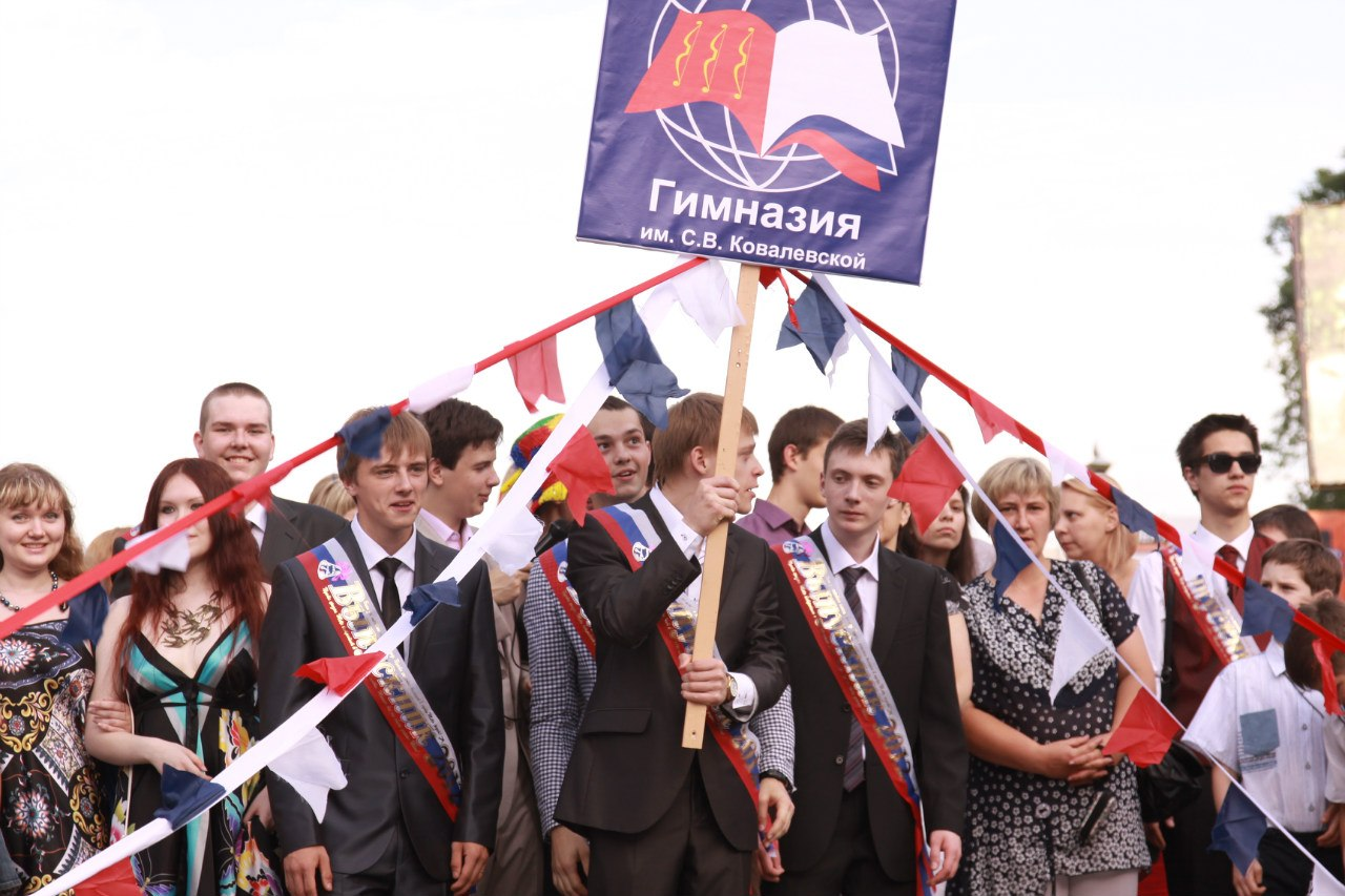 "Бригантина" - 2012